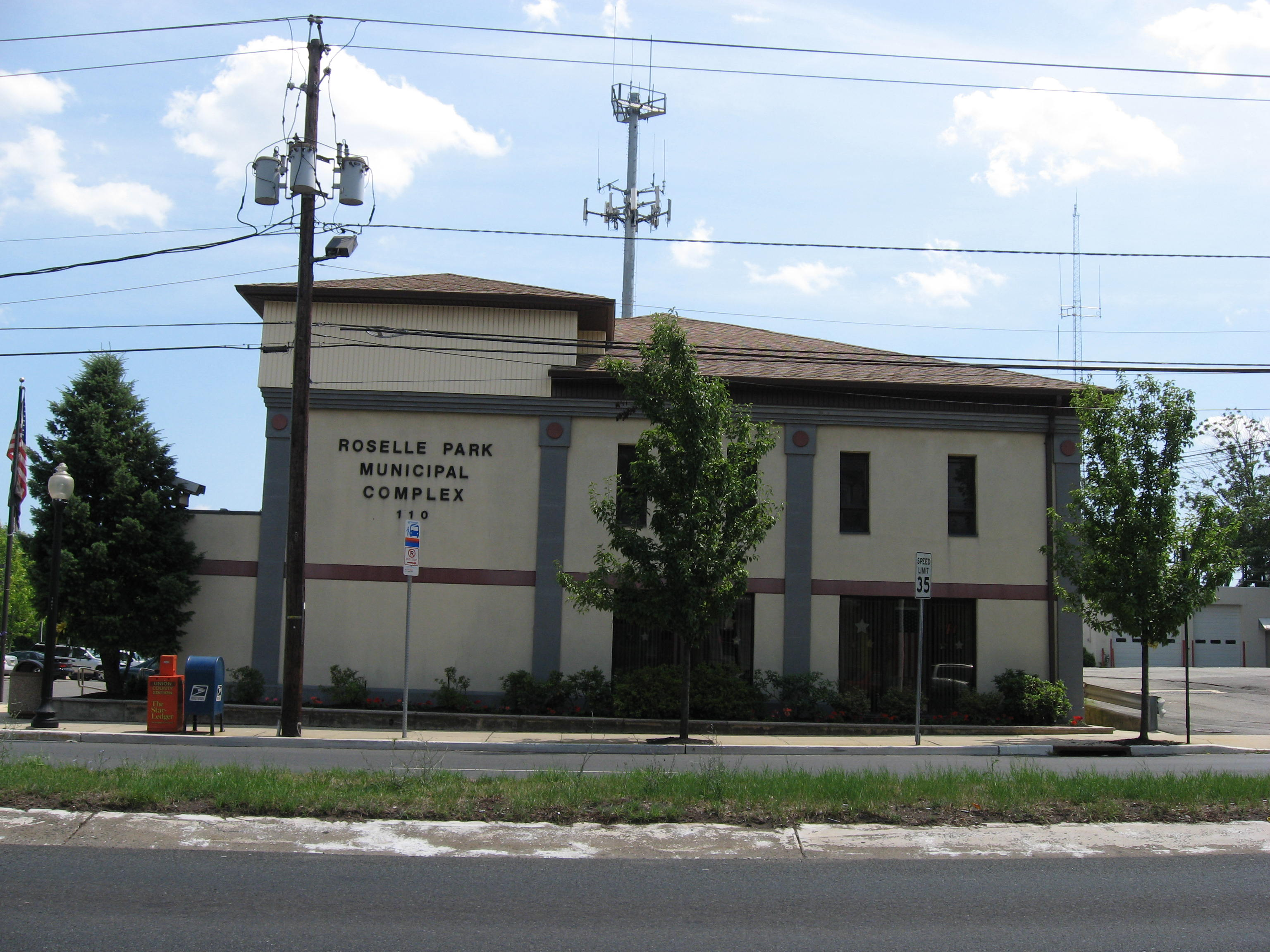 Roselle Park Municipal Complex